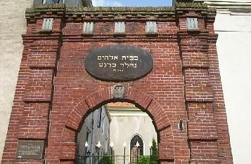 Synagogue in Elburg, Netherlands.